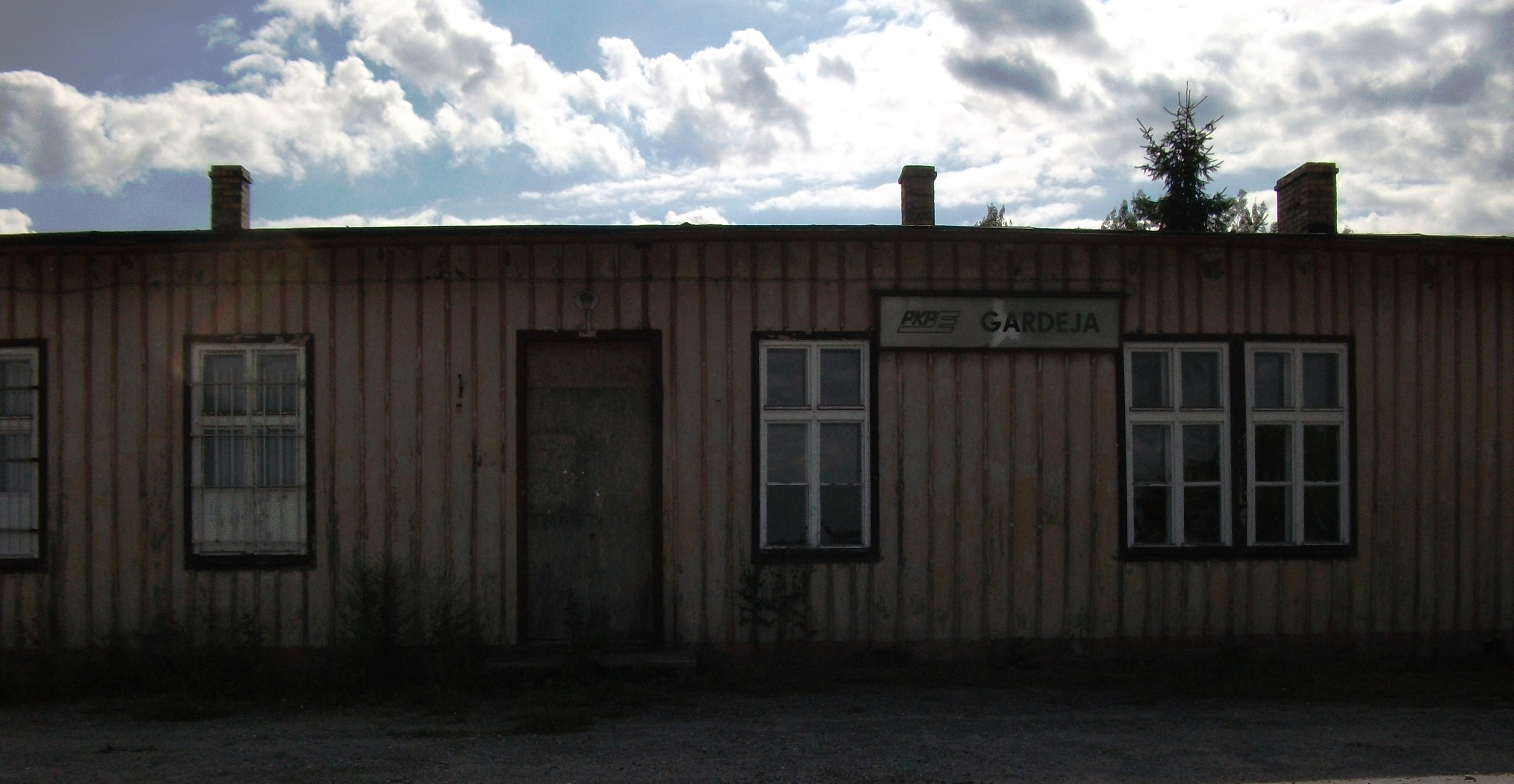 PKP Gardeja 2